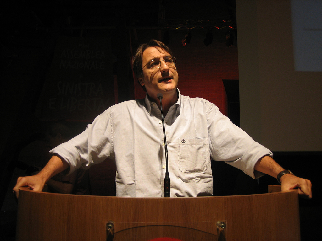 Claudio Fava introduce l'Assemblea Nazionale di Sinistra e Libertà